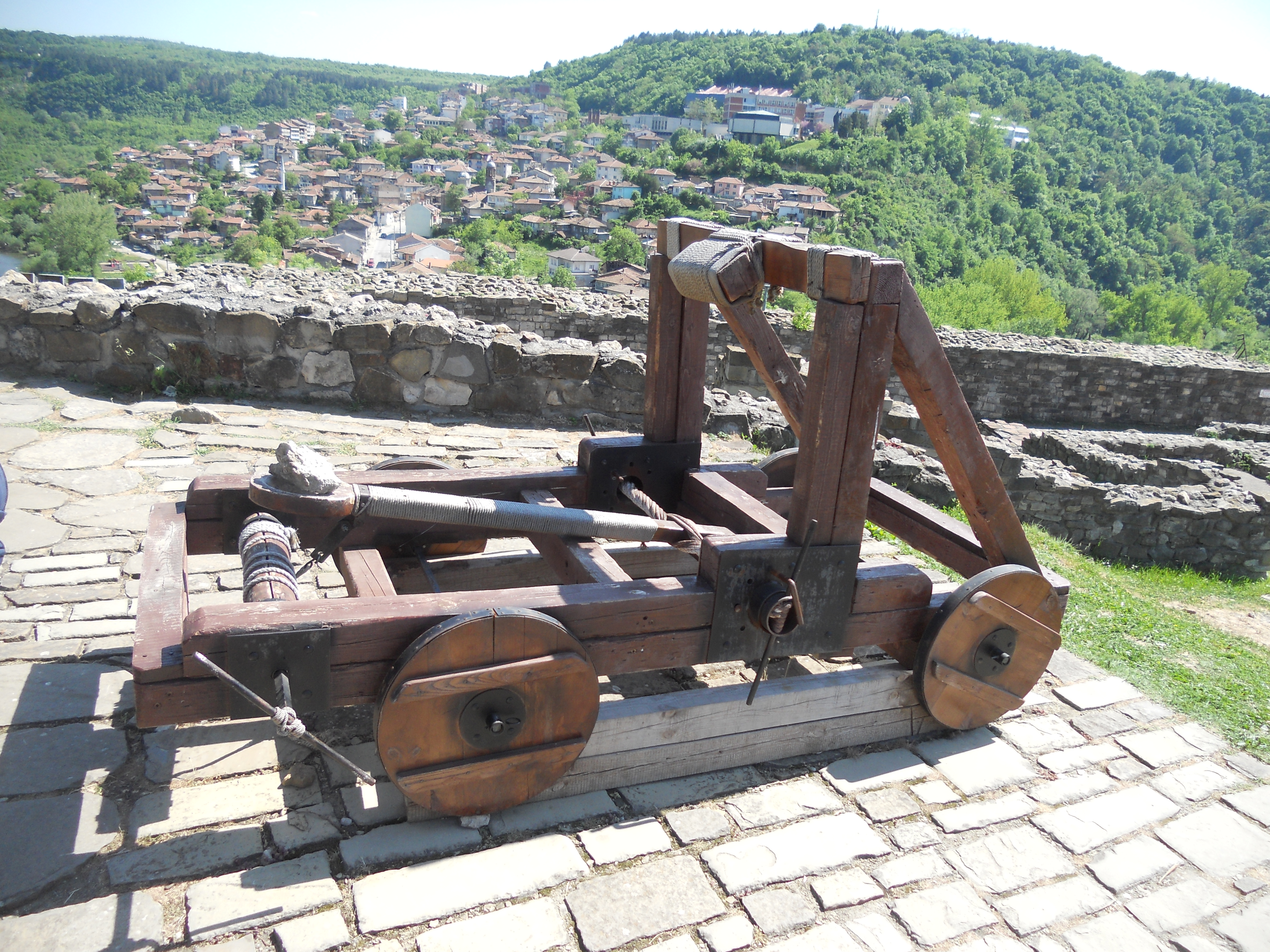 Стебонойна обсадна машина - катапулт, крепост Царевец